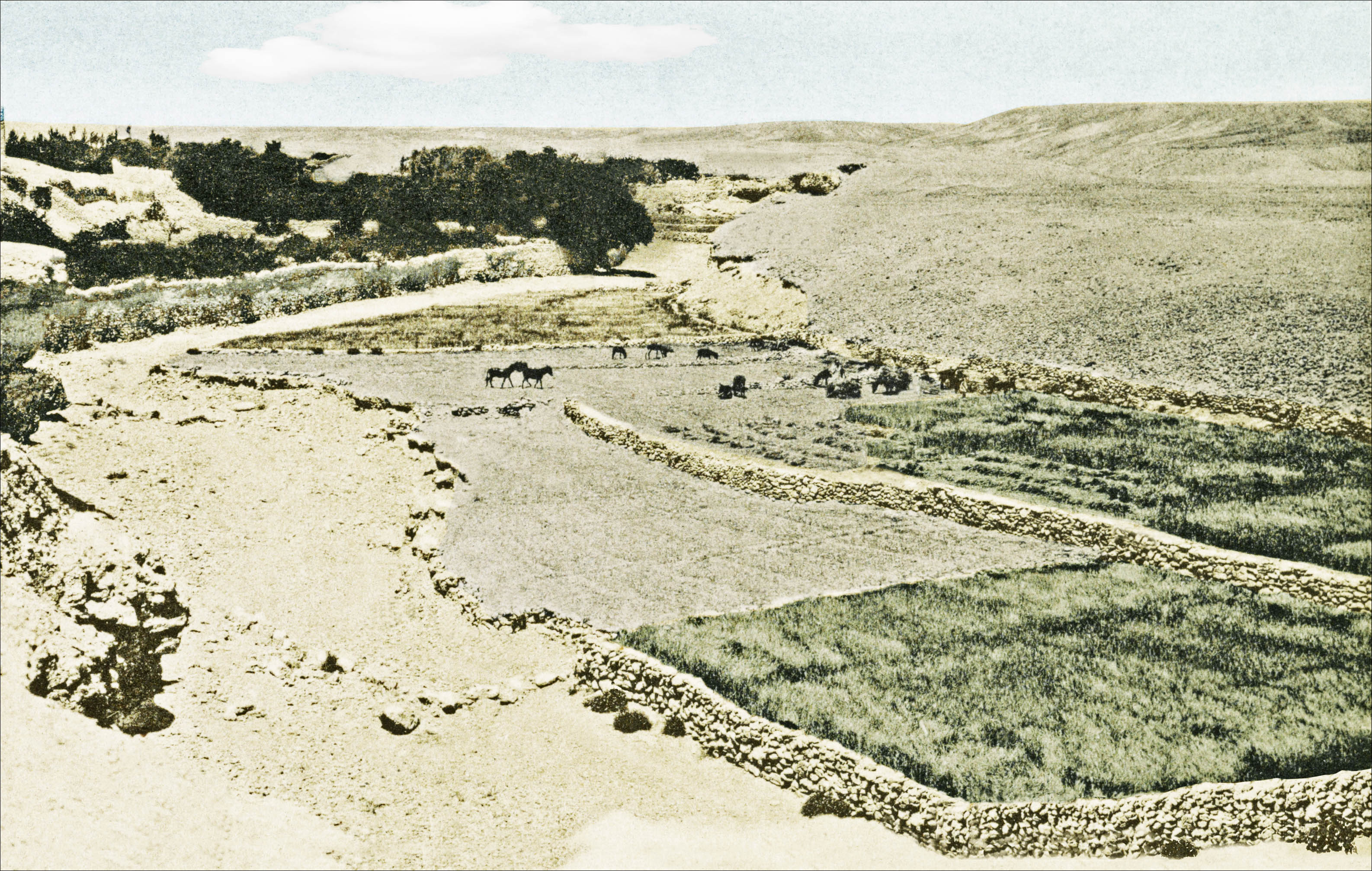 Les cultures en terrasse et en fond du wadi. On voit bien les différents murets.